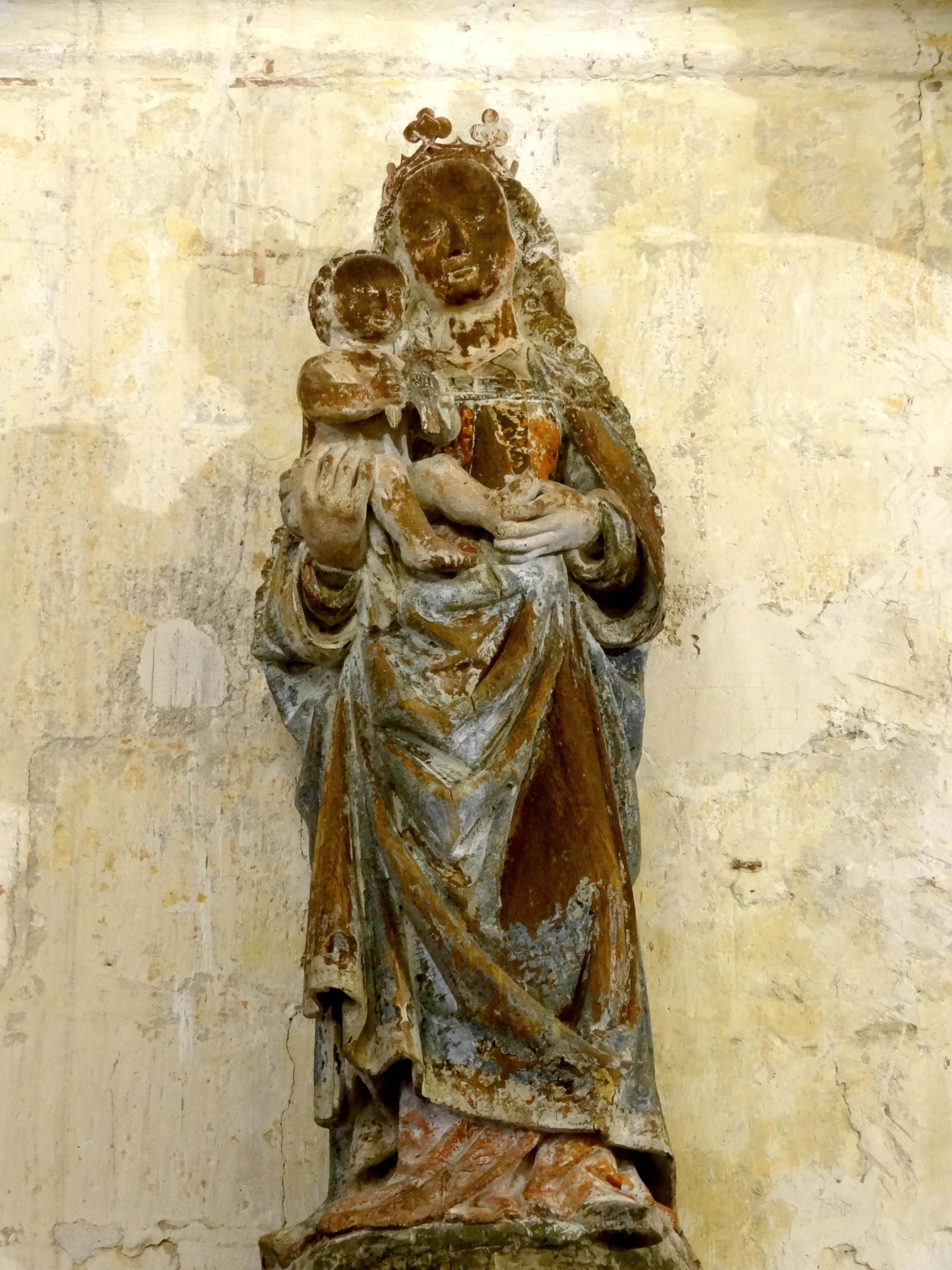 Mobilier de l'église: Vierge à l'Enfant